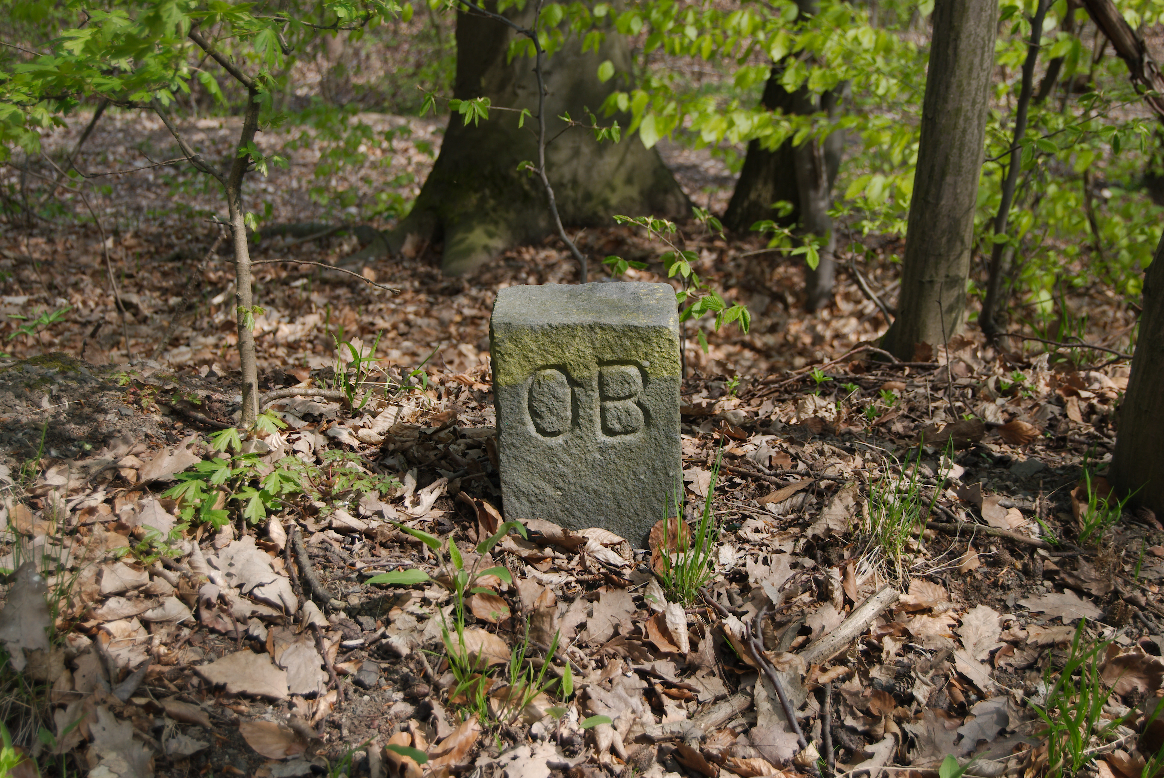 Tento kámen vedle východního okraje silnice spojující brněnské čtvrtě Soběšice a Útěchov, nese v katastrální mapě č. 26 a vyznačuje přímku, která vznikne mezi ním a kamenem na protější straně silnice, který vypadá stejně a nese v katastrální mapě číslo 27. Uprostřed této přímky se linie lomí k severu a to tak, že prochází od onoho kamene č. 27 do středu silnice a pak prochází středem silnice směrem k severu. A jedná o katastrální hranici mezi Bílovicemi nad Svitavou a brněnskou městskou částí Brno-Útěchov